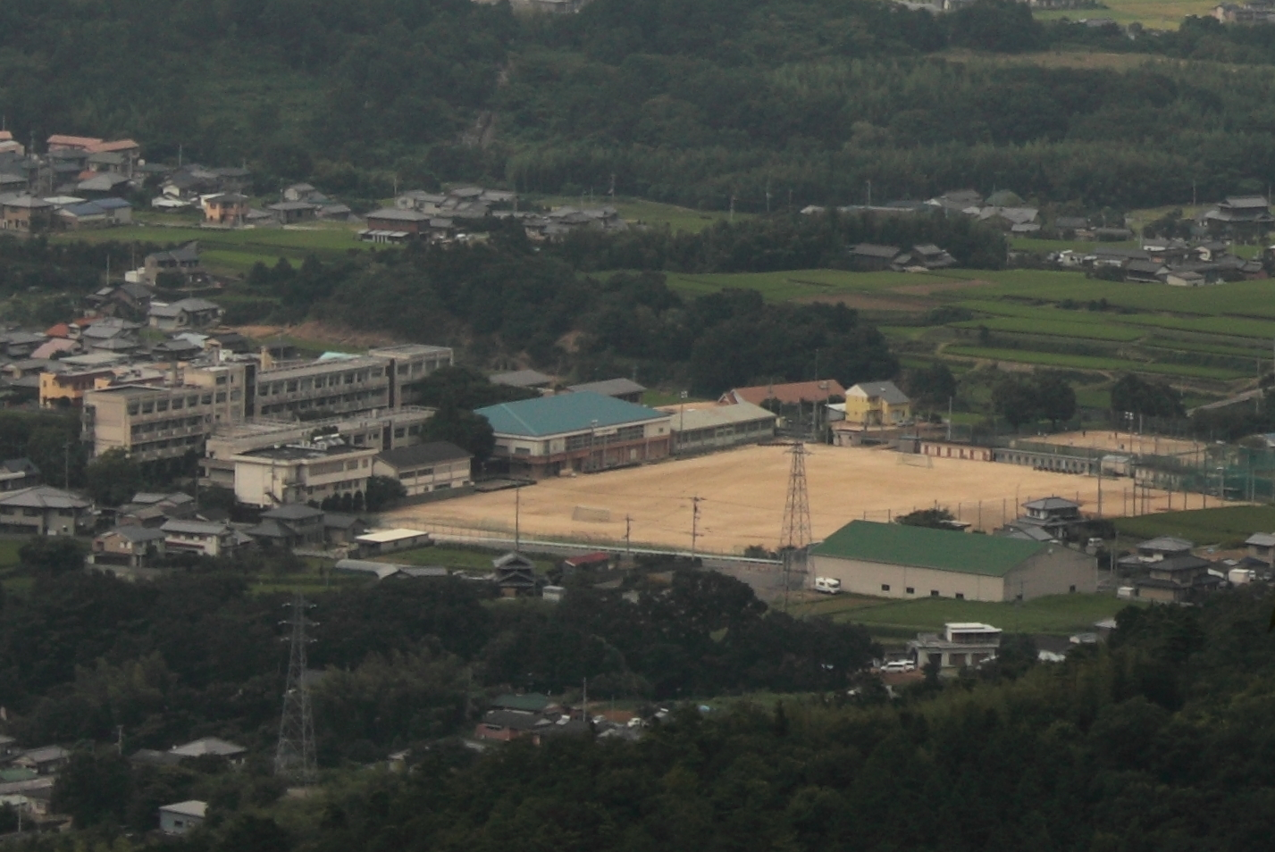 川島高校